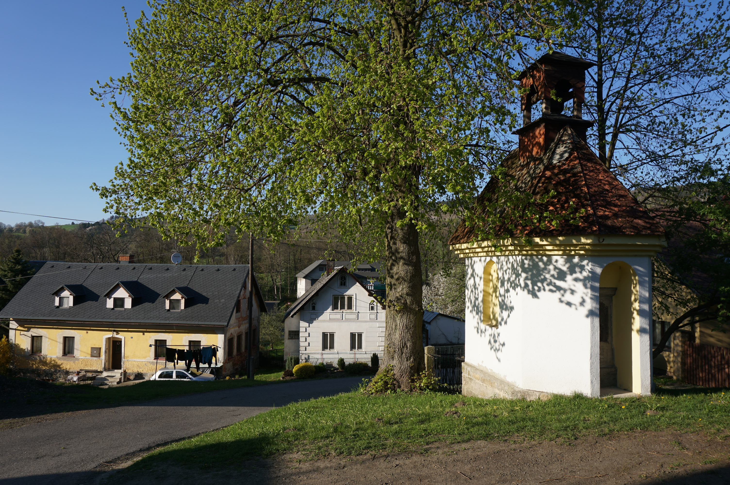 Sestroňovice - náves s kaplí, v pozadí domy čp. 2 a 3